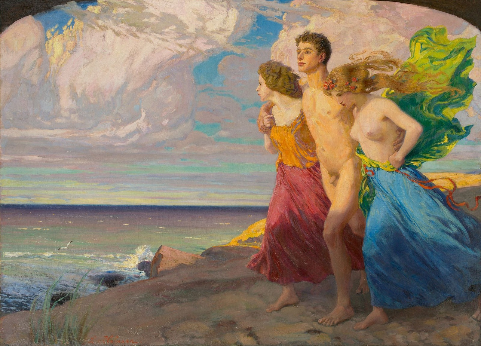 Ludwig von Hofmann (1861-1945), La Tempête.